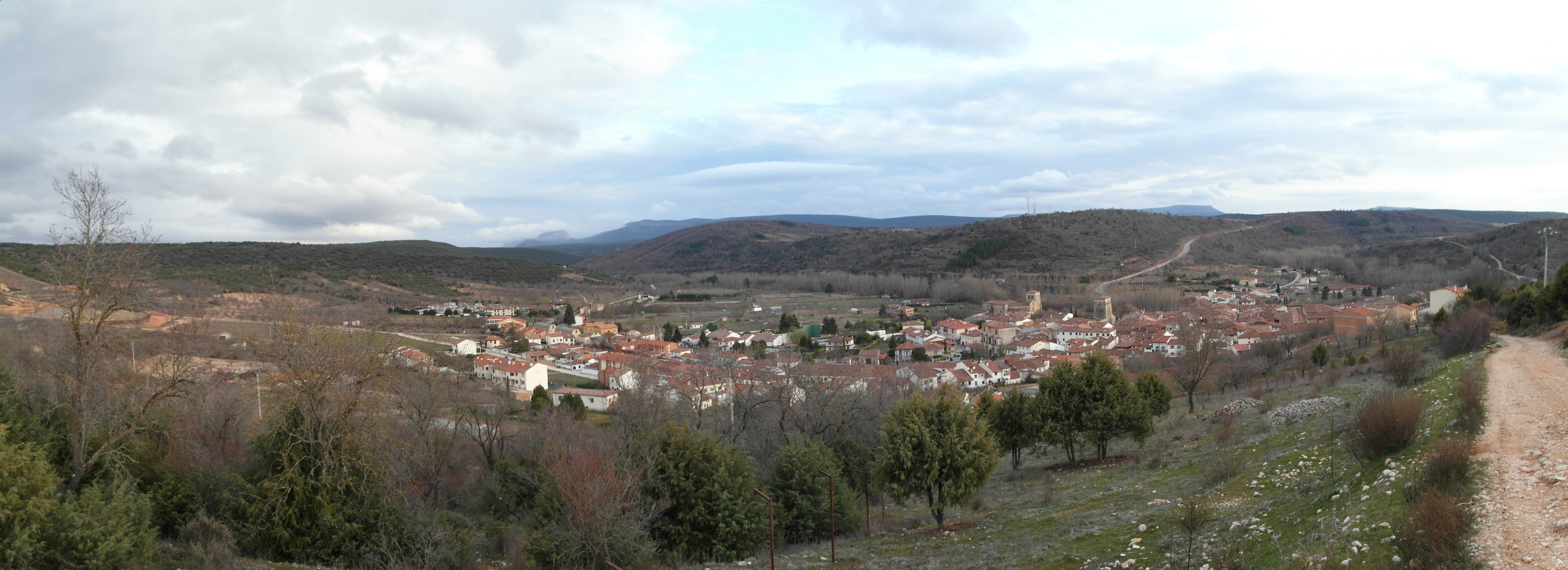 Covarrubias, Burgos.